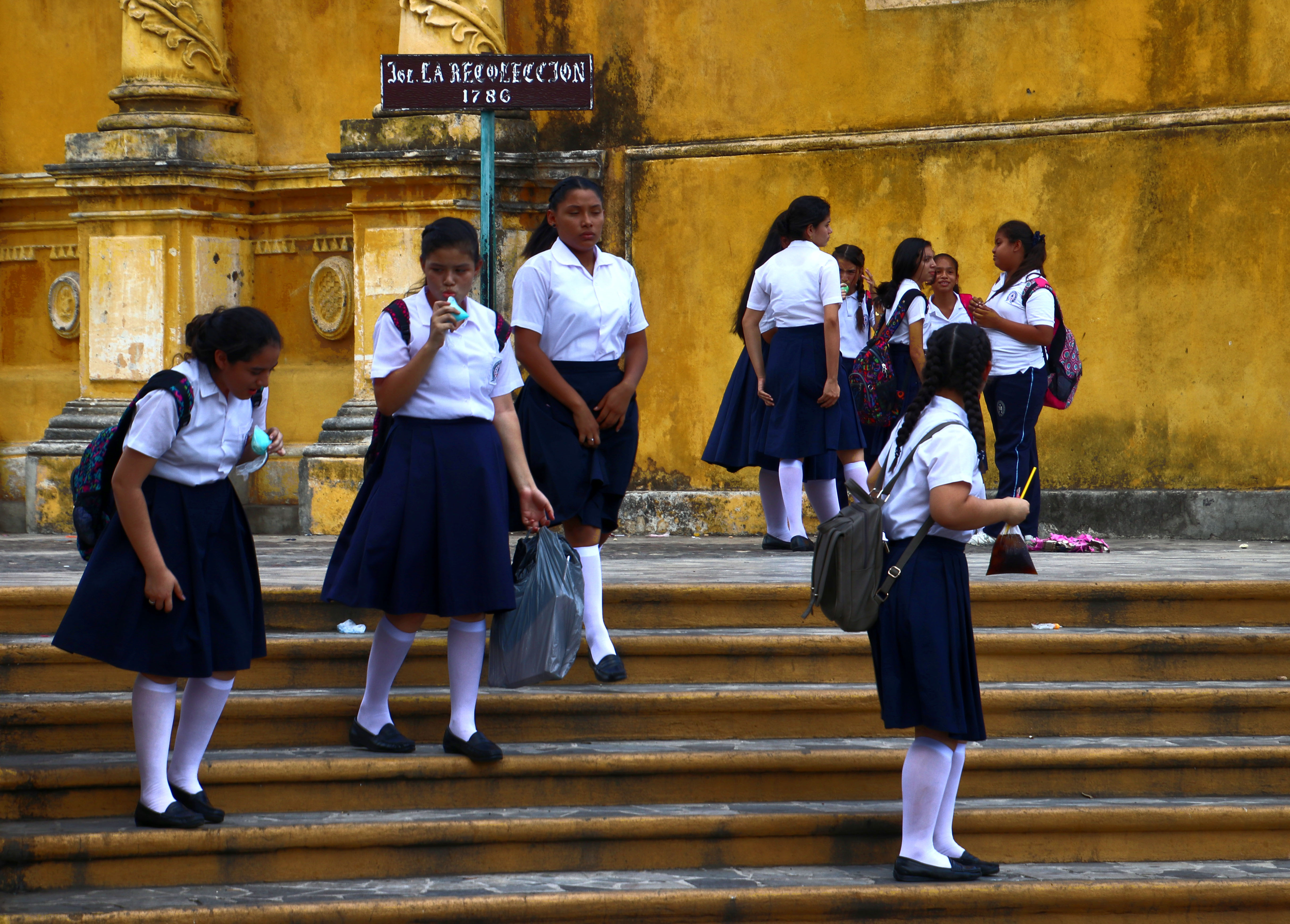 León. L'Eglise de la Recolección.